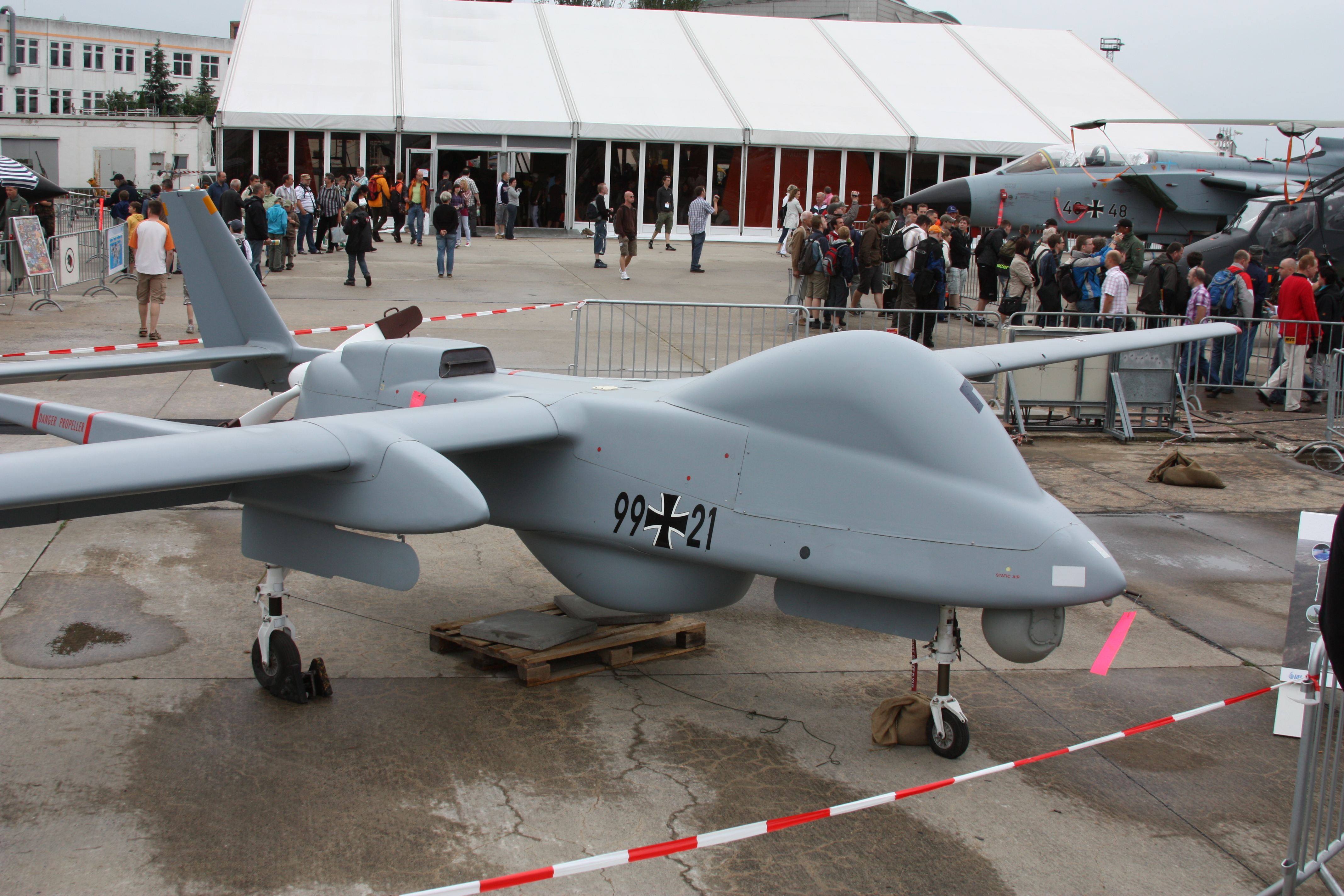 ILA 2010, am Samstag aufgenommen, meist erhöht von einer Leiter fotografiert